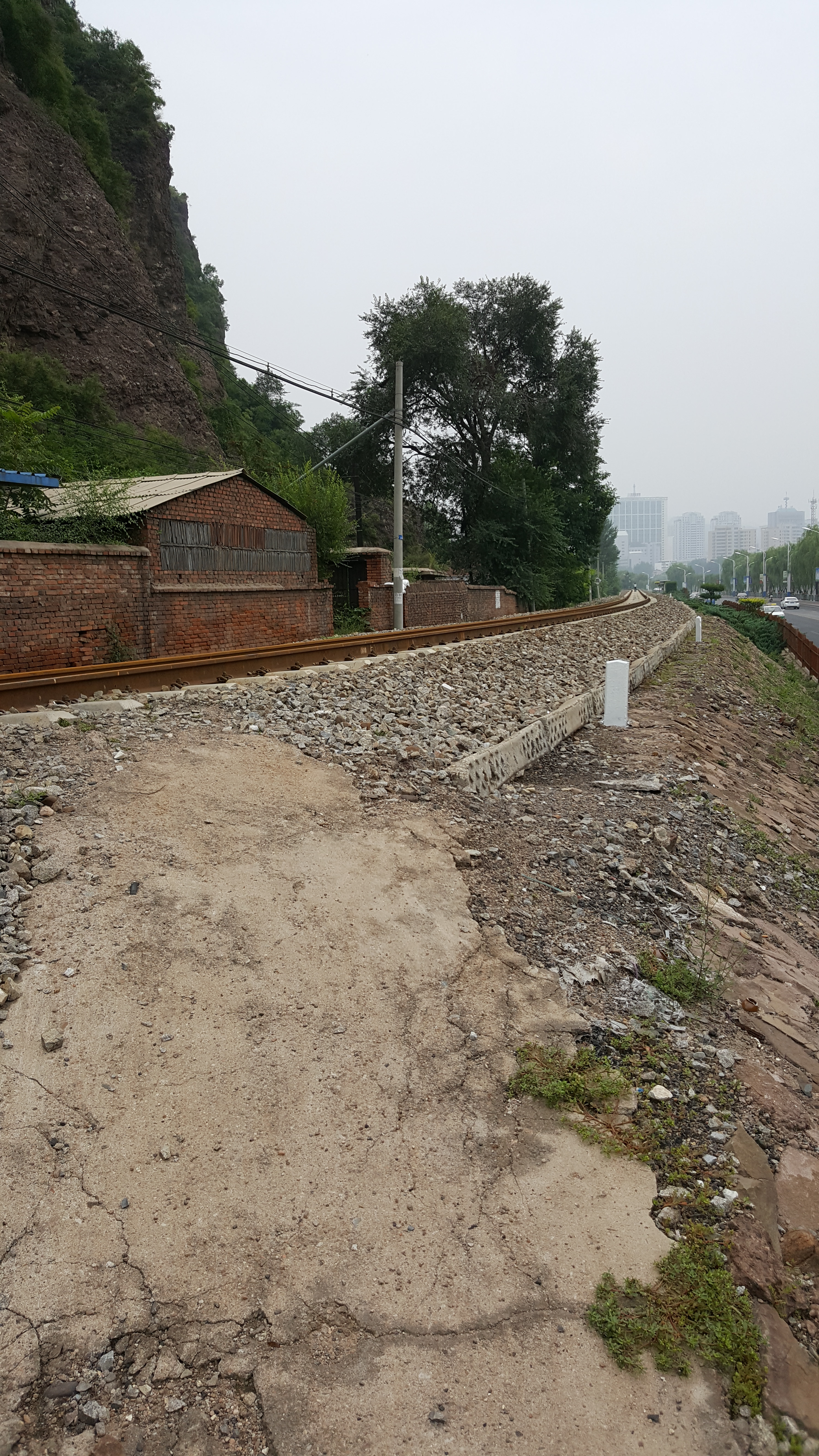 中文（中国大陆）: 承隆铁路承德市区段 （承德方向）